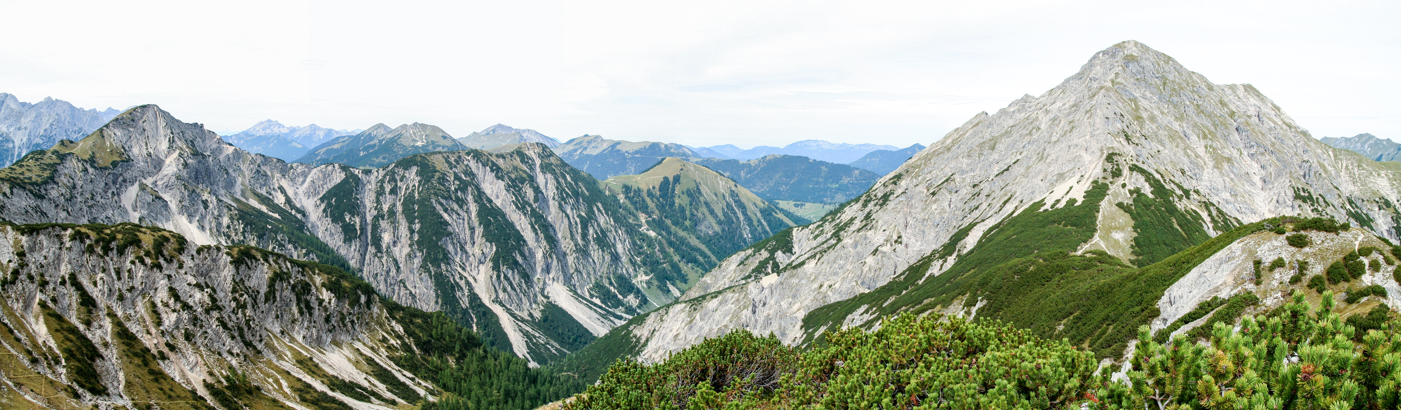 Links der Kompar und rechts die Montscheinspitze.